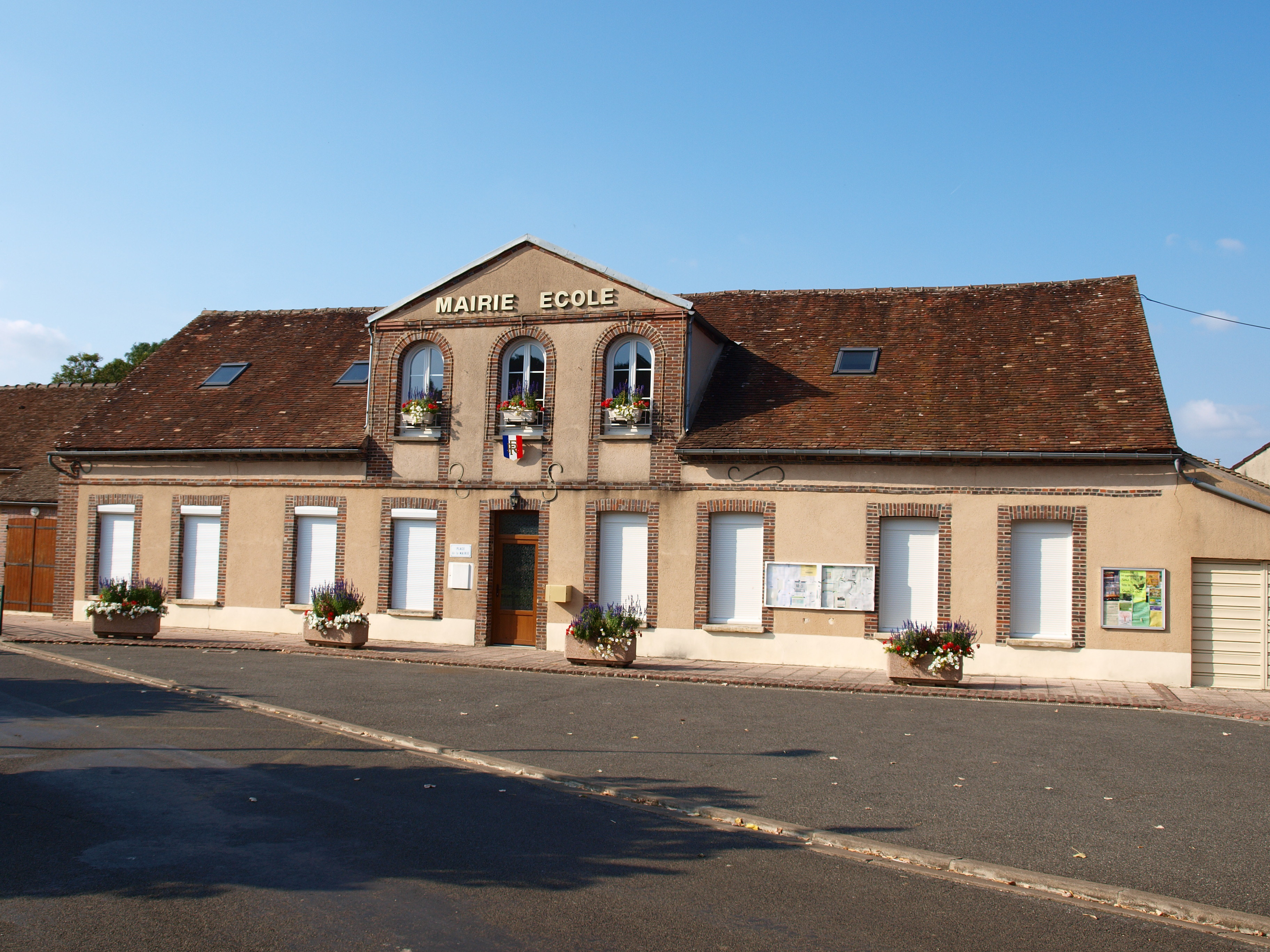 Noé (Yonne, France) ; mairie